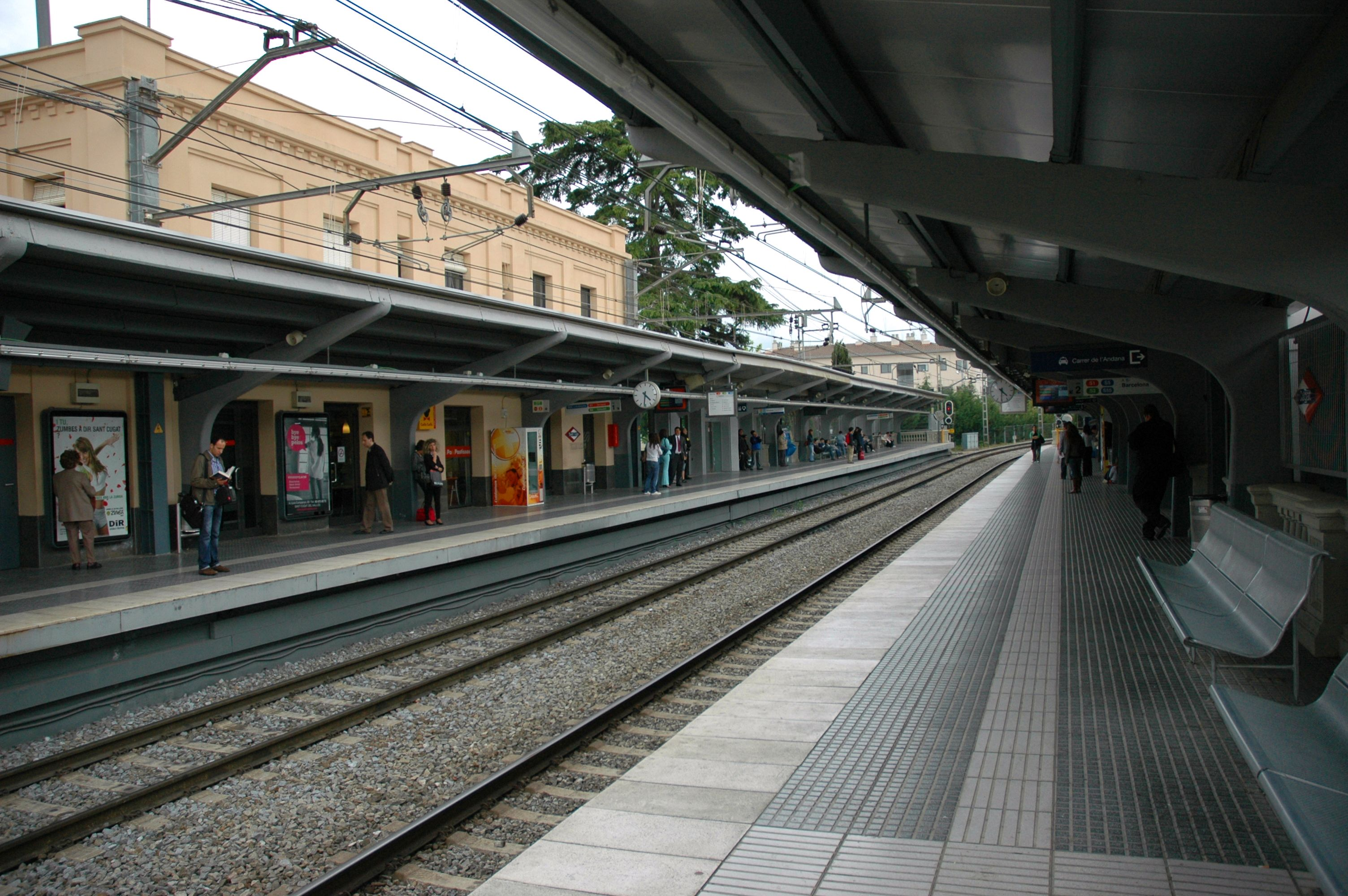 Estació de Sant Cugat